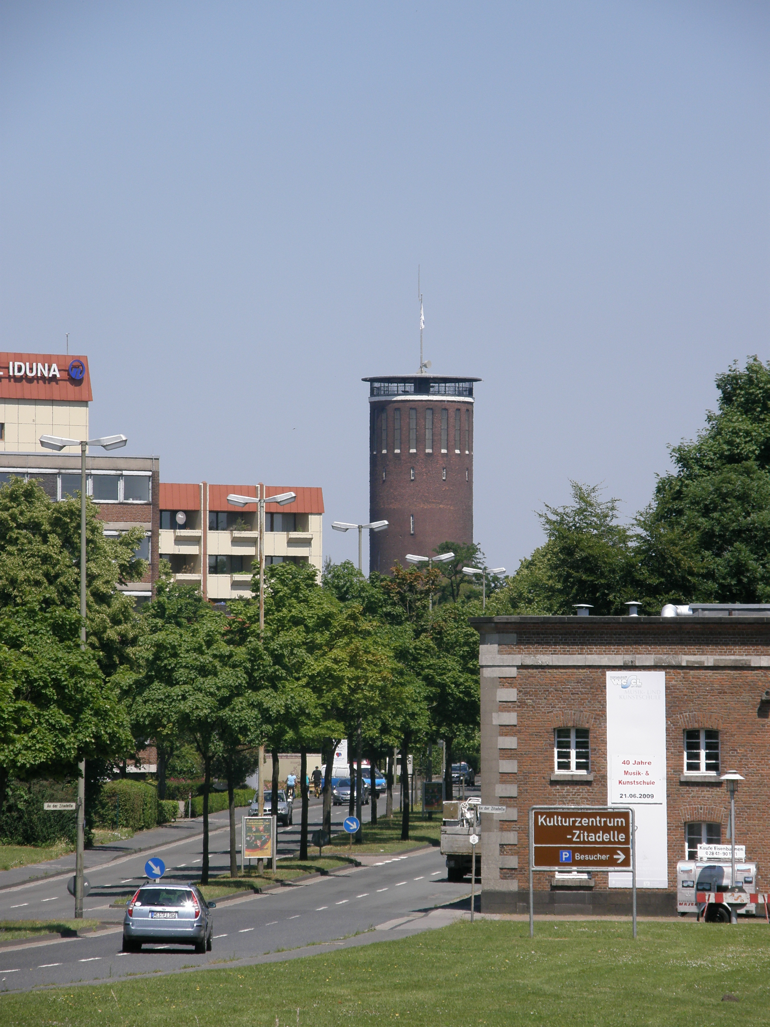 Der Wasserturm in Wesel mit anderen Stadtgebäuden und Teilen der Zitadelle